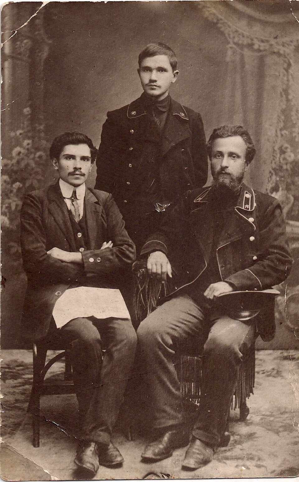 Беларуская (тарашкевіца): Максім Гарэцкі (пасярэдзіне) падчас вучобы ў Горы-Горацкай каморніцка-агранамічнай вучэльні. Хведар Чарнышэвіч, Максім Гарэцкі (стаіць) і Лявон Гмырак.